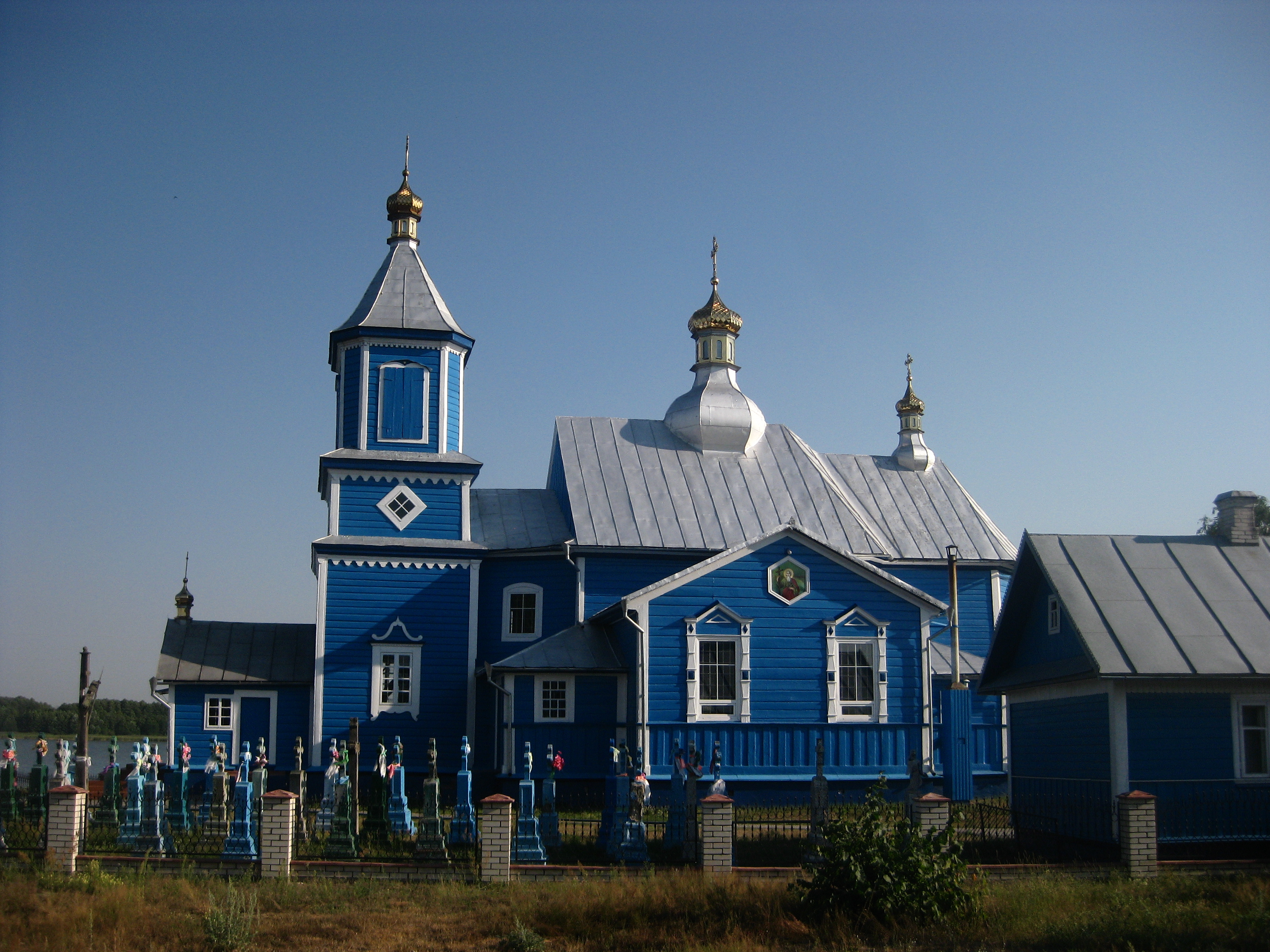 Казанська церква (дер.), Піща